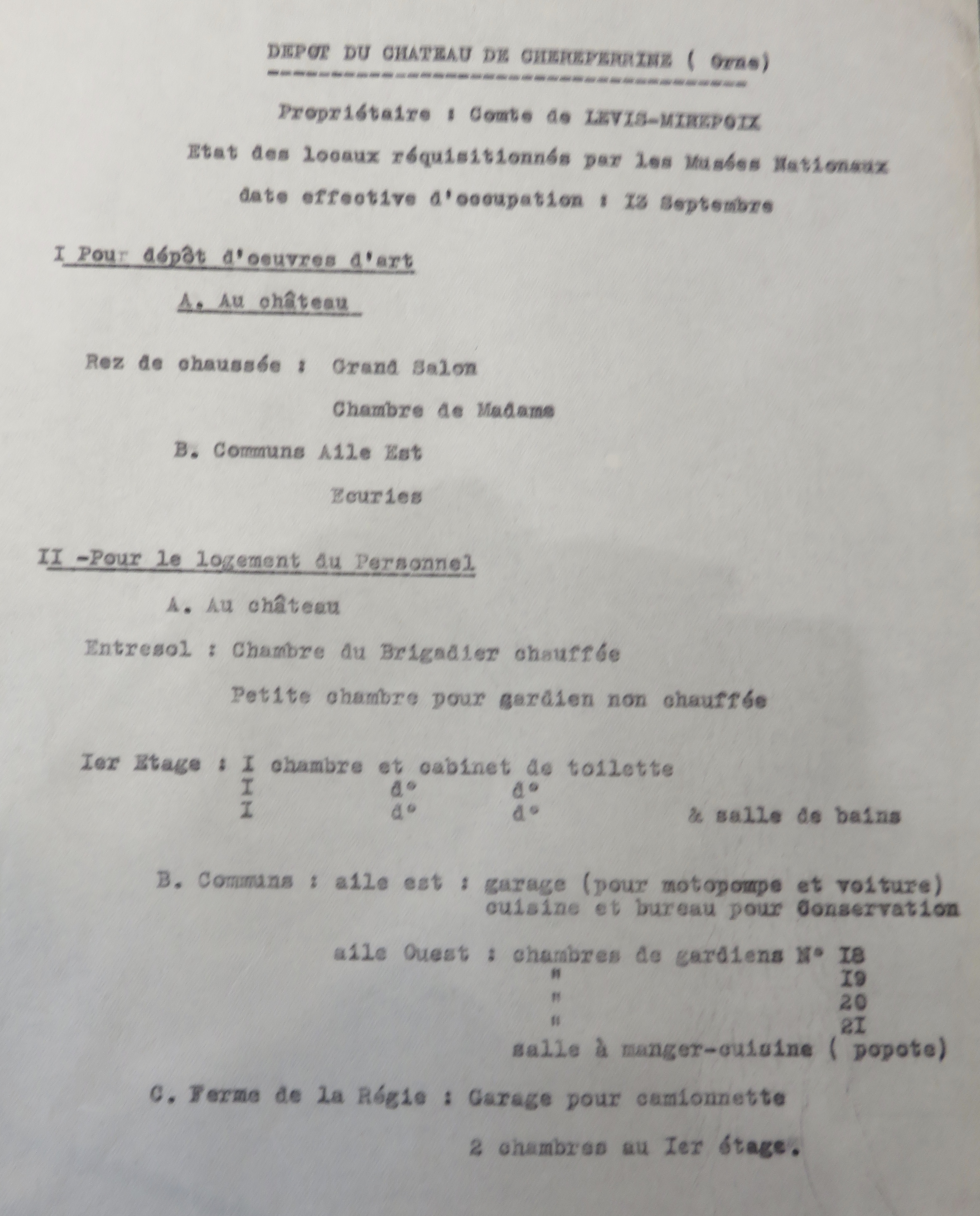 Note dactylographiée de l'administration des musées relative au château de Chèreperrine